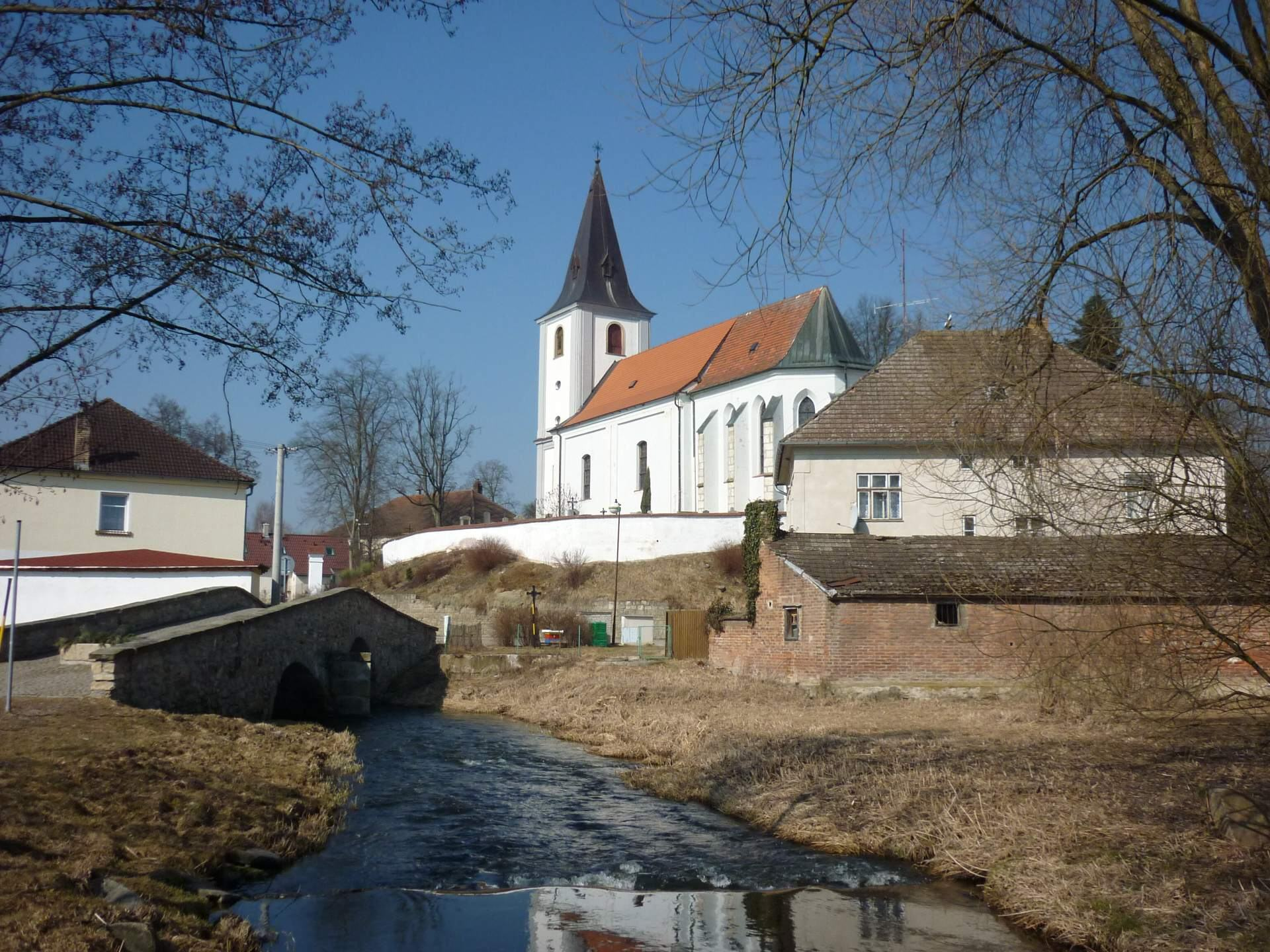 Jarošov nad Nežárkou